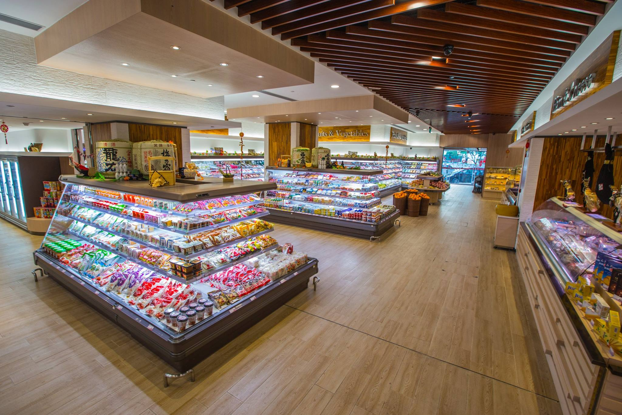 マカオのグランドマートの裏の撮影。